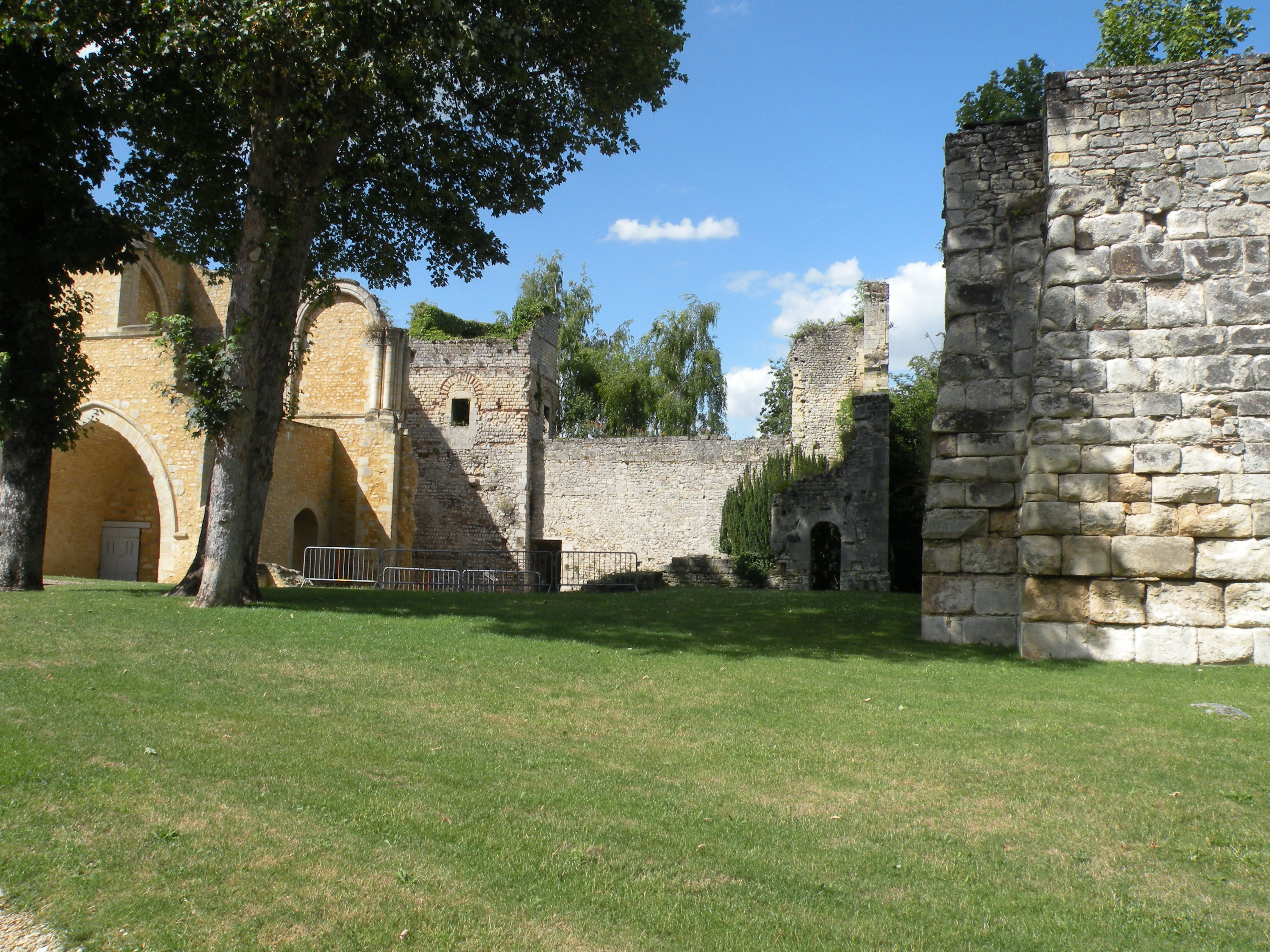 Château royal de Senlis (Oise). A gauche, le portail d'accès aux appartements royaux, et au-dessus, la tribune occidentale de la chapelle royale Saint-Denis, qui en est le dernier vestige. A droite, l'on aperçoit un angle de la grosse tour carrée du Xe siècle, antérieur au château royal rebâti vers le milieu du XIIe siècle sous Louis VI le Gros.